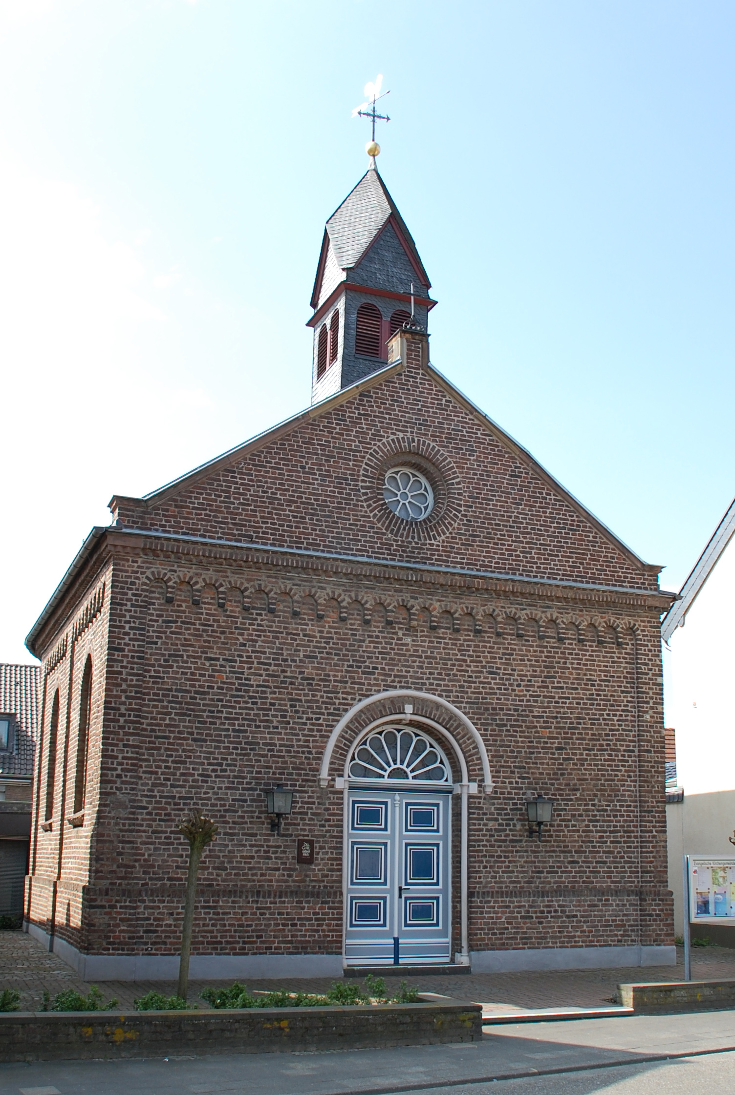 Johanneskirche in Kerpen, Germany